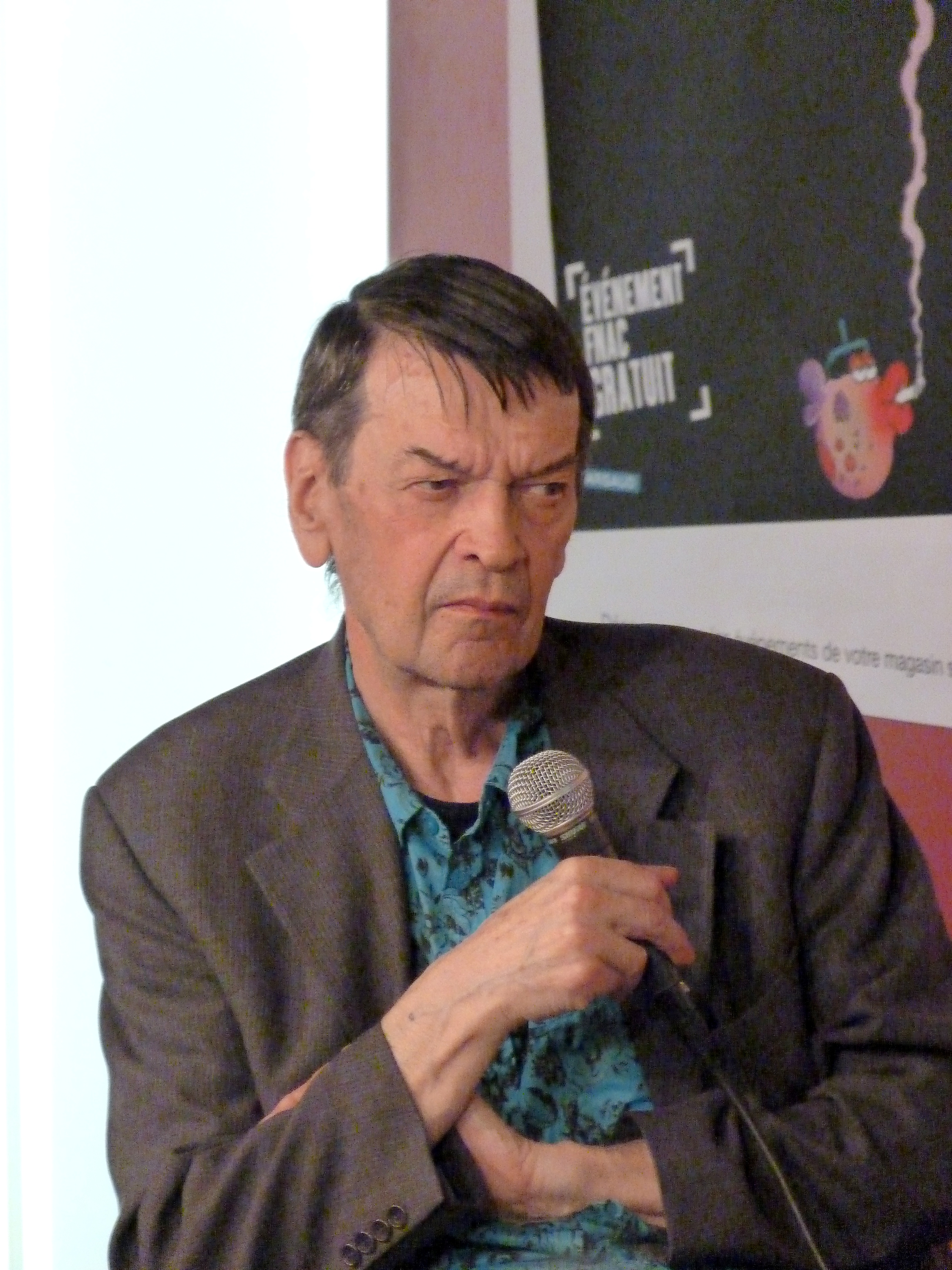 Nikita Mandryka lors de la présentation, en compagnie de Marcel Gotlib, de leur bande dessinée Clopinettes, le samedi 2 juillet à la FNAC Montparnasse (Paris, 6e arrond.).